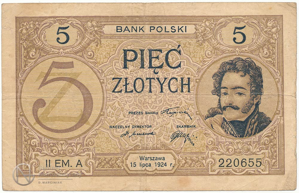 5 złotych 1924 awers